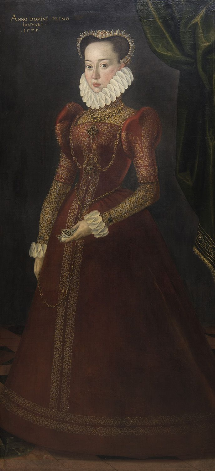 Portrait of Barbara von Pfalz-Zweibrücken-Neuburg (1559-1618) or Anna or Elisabeth